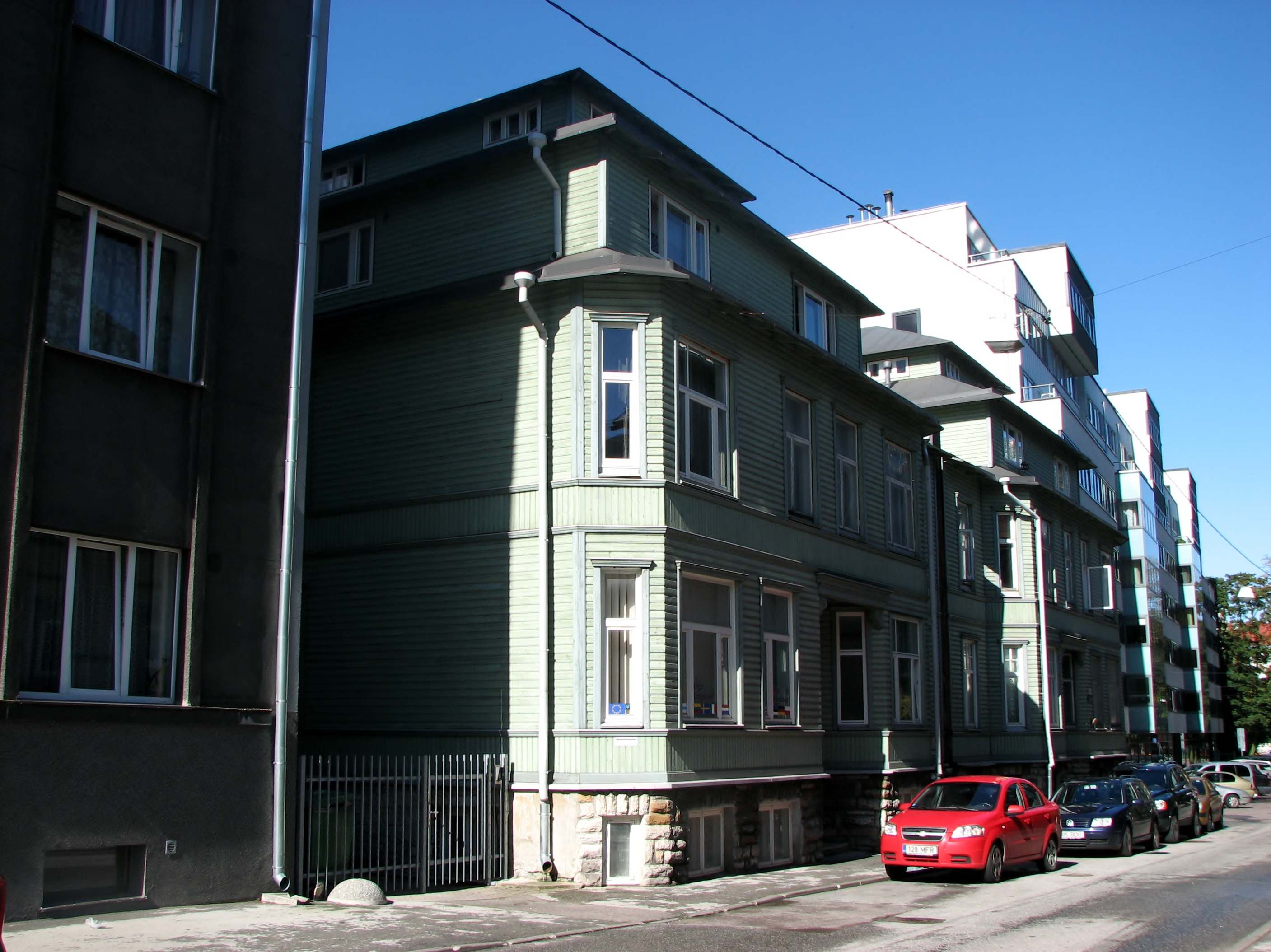 Elamu 1912. aastast, kus 1934–1944 elas August Gailit